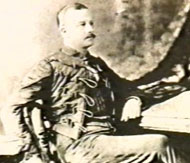 Первый командир полка Цейлонской лёгкой пехоты подполковник Джон Скот Армитаж (LT.COL. John Scott Armitage)